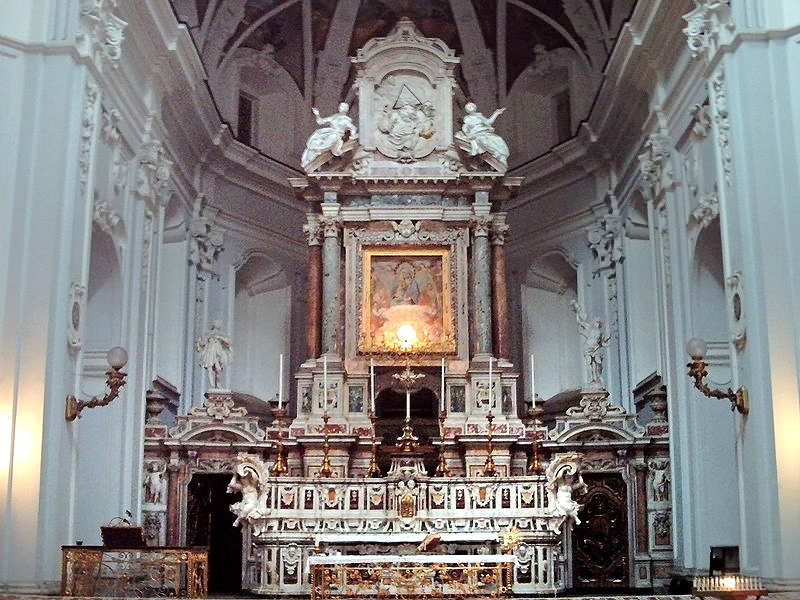 Altare maggiore Chiesa di Santa Maria di Costantinopoli (Napoli)